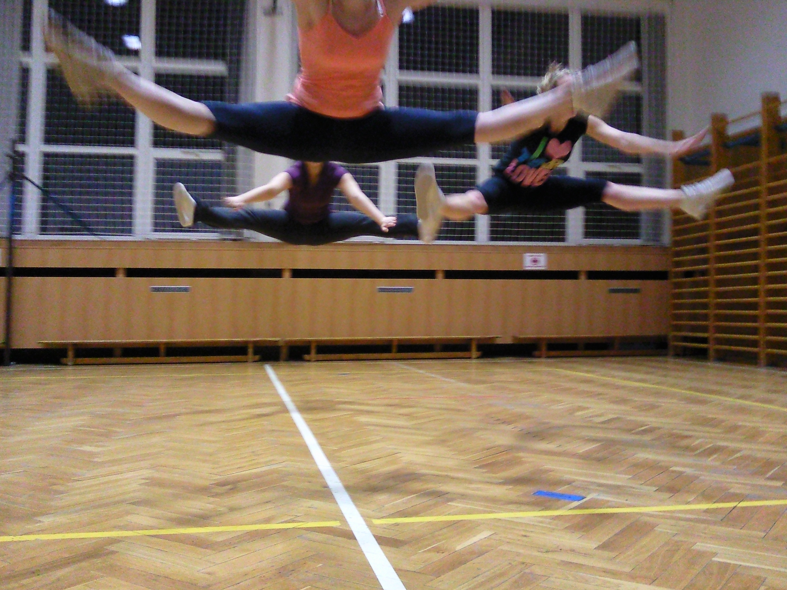 Fitness aerobic- flexibilita- skok zvaný straddle